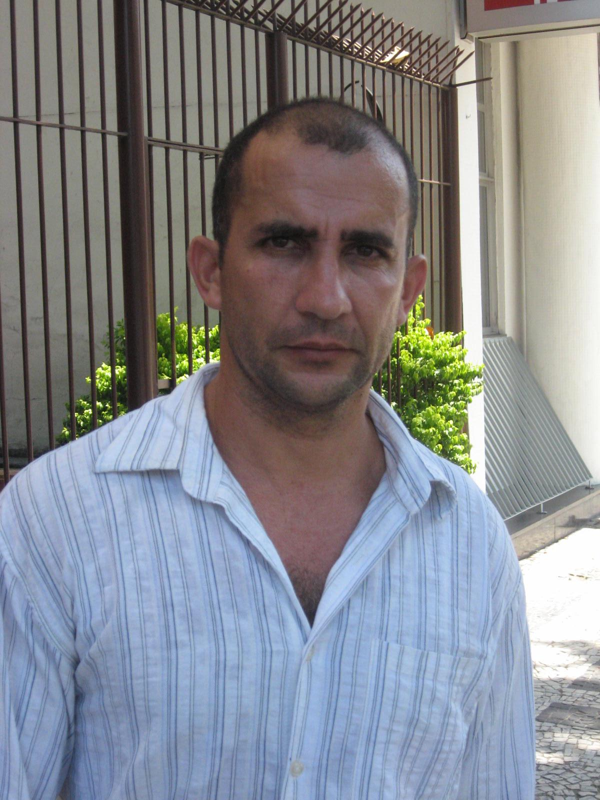 Alexandre Nascimento Garcia, presidente do Grêmio Mangaratibense.